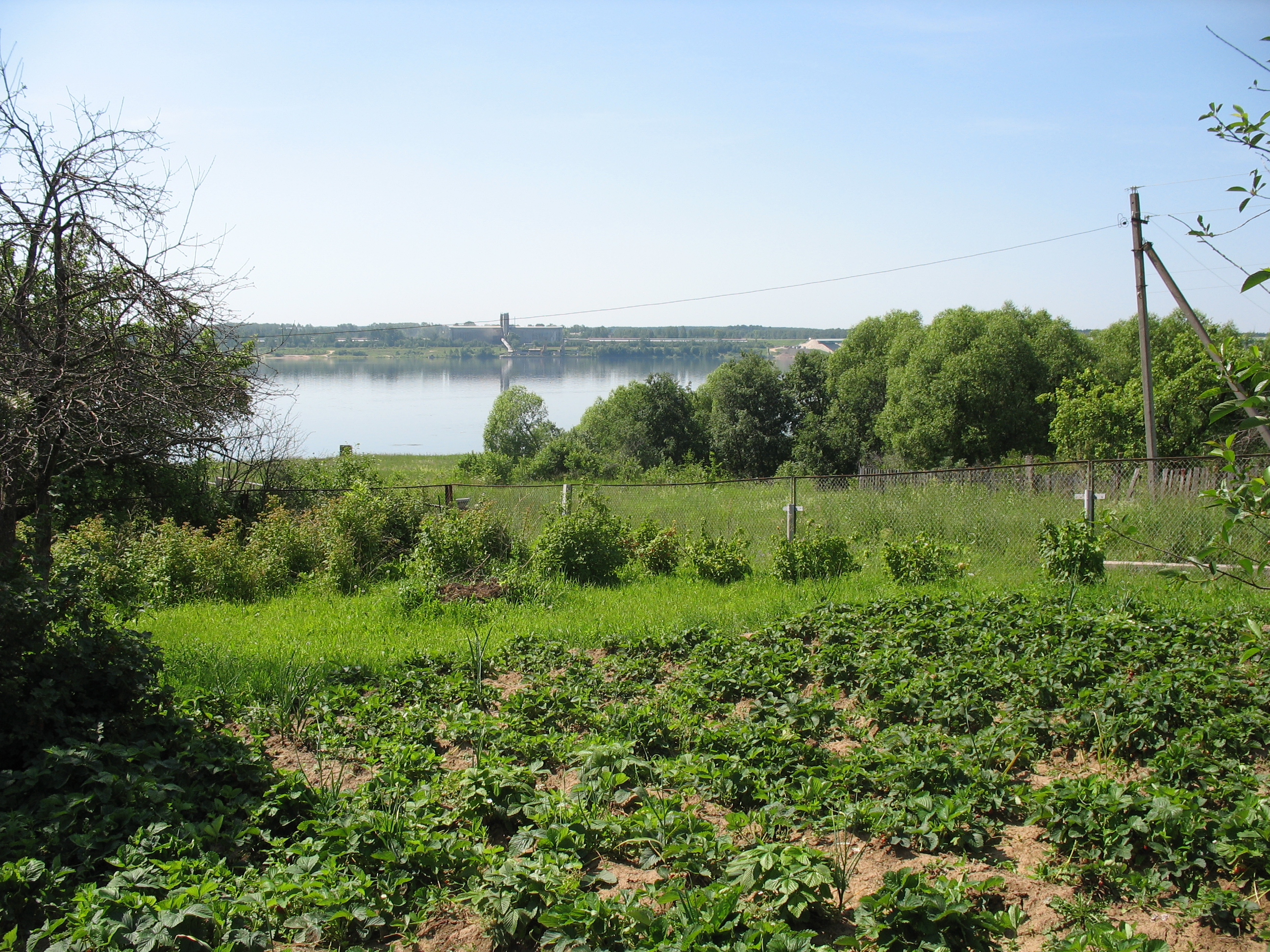 Огород т. Нади (бывший наш)